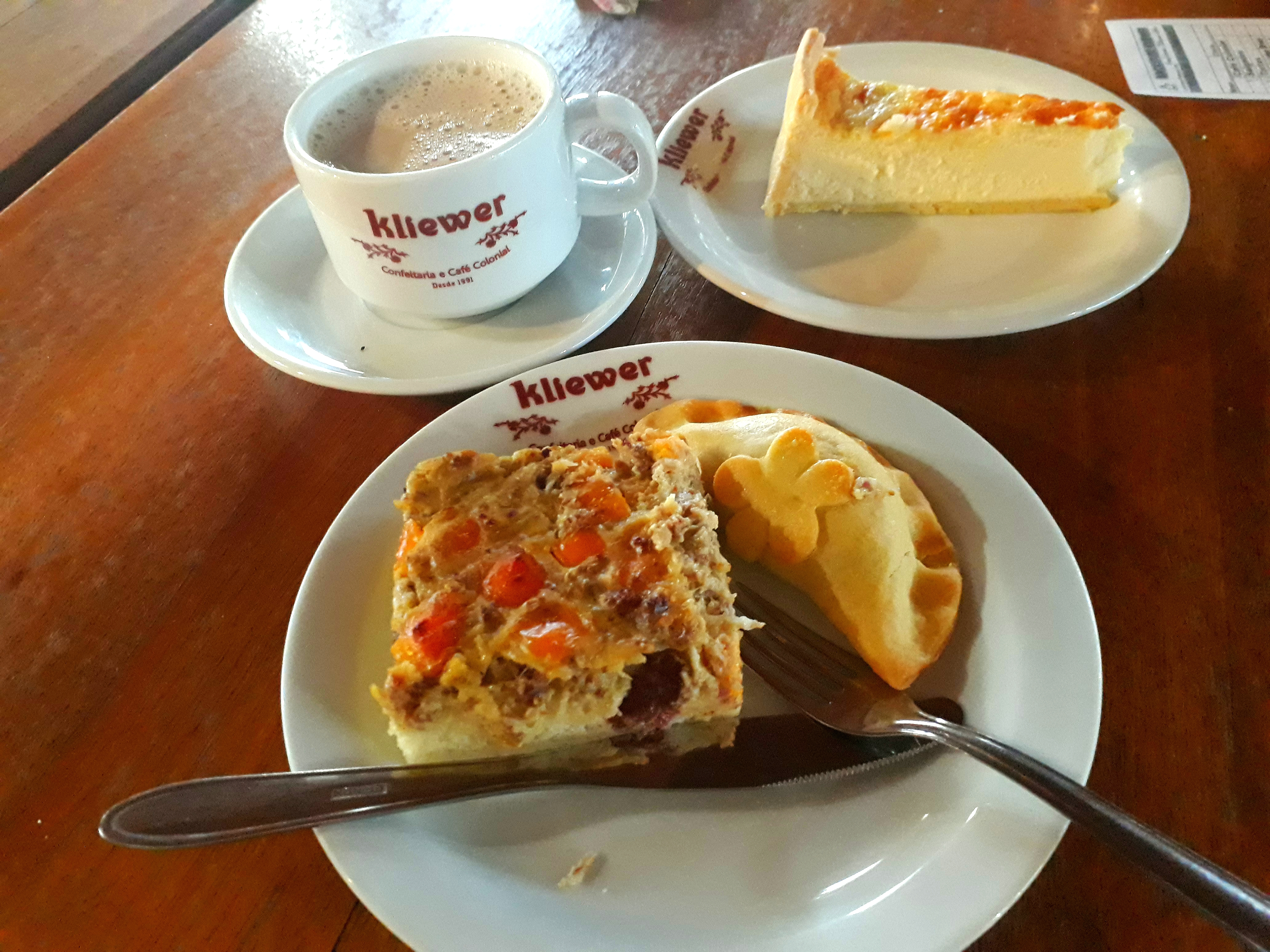 Café na Confeitaria Kliewer, na Colônia Witmarsum, em Palmeira, no Paraná.